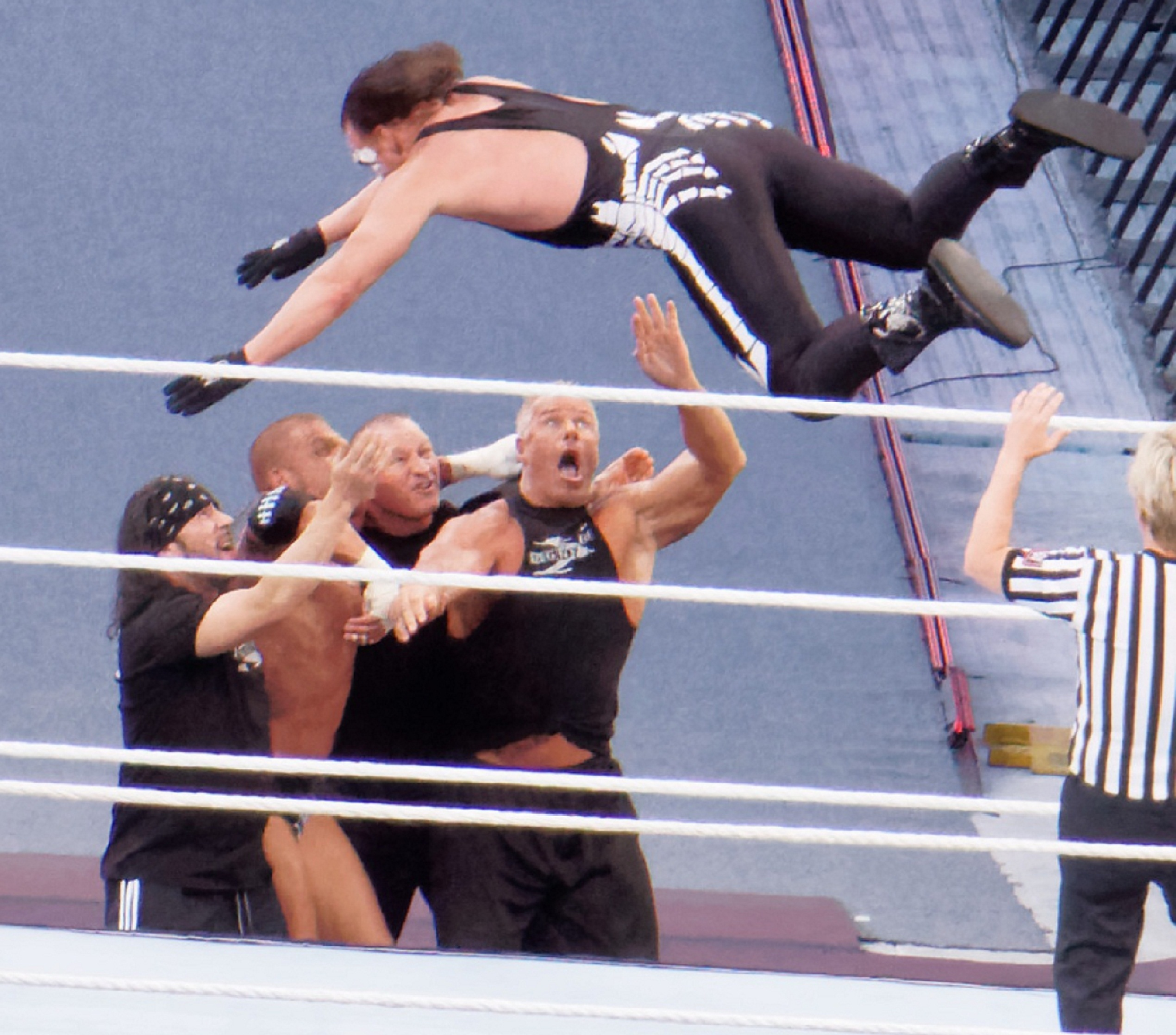 2015-03-29_17-15-24_ILCE-6000_7268_DxO